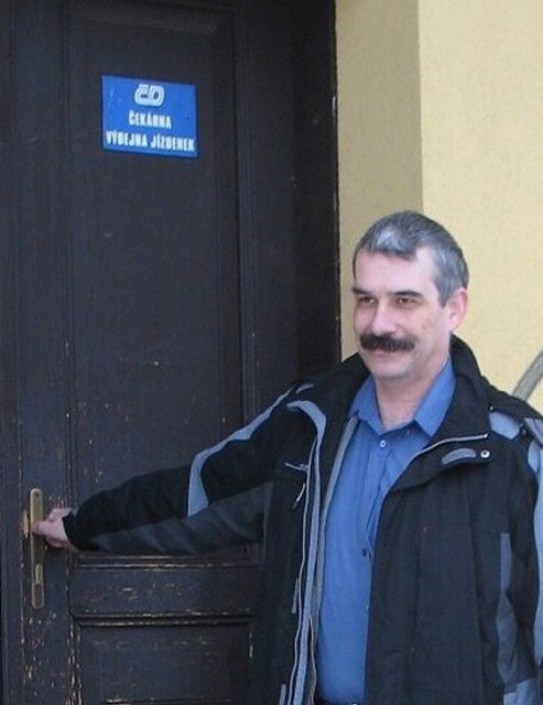 Zdeněk Šindlauer na zastávce Česká Lípa střelnice